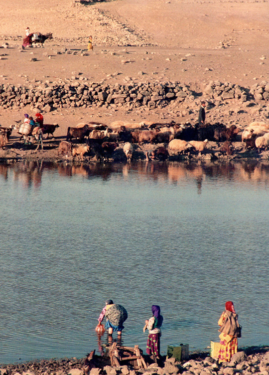 Lisans